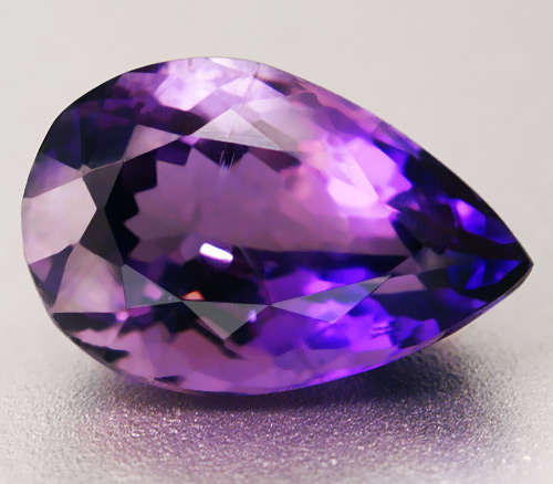 скаполит